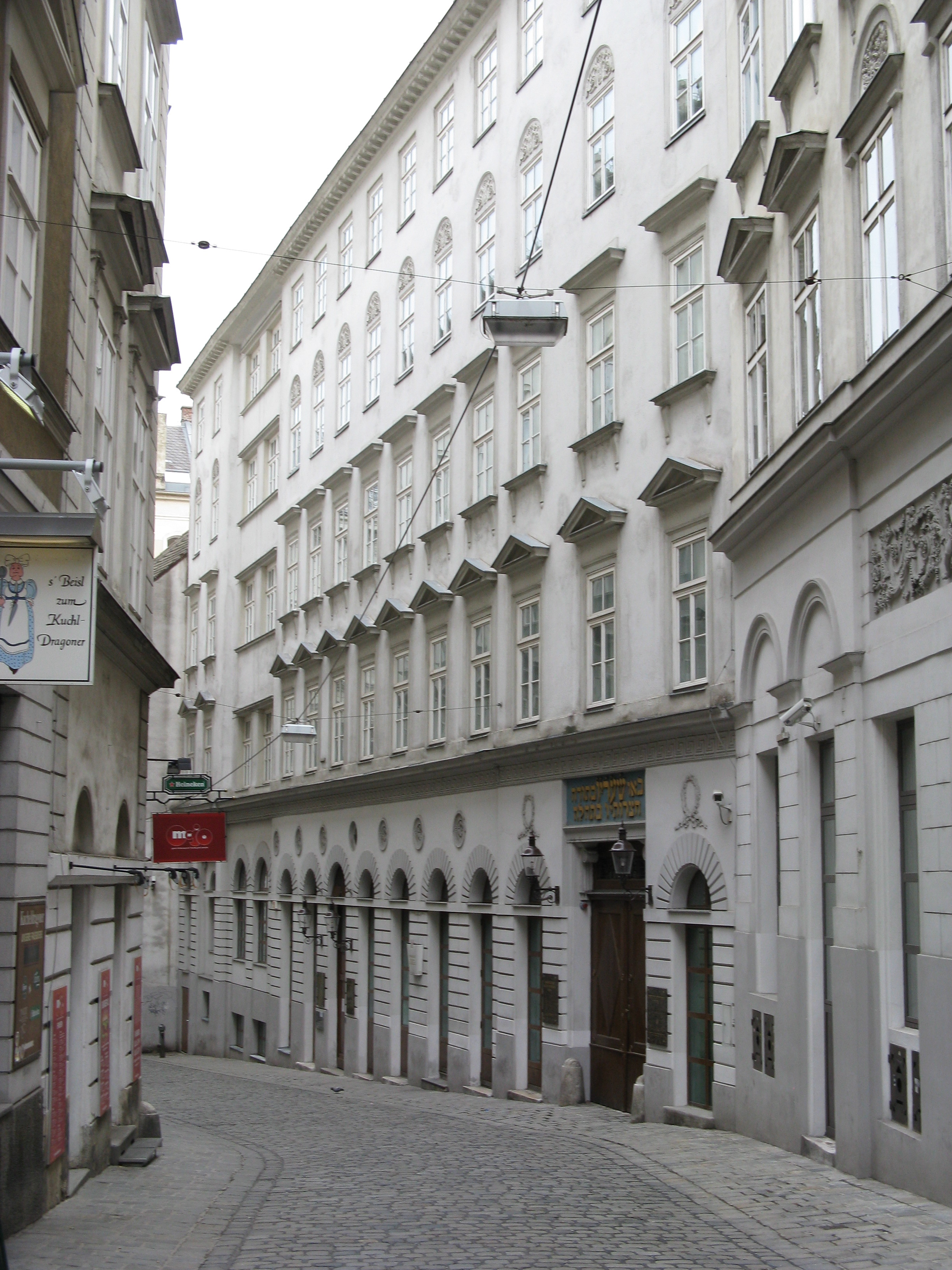 Stadttempel in Vienna.